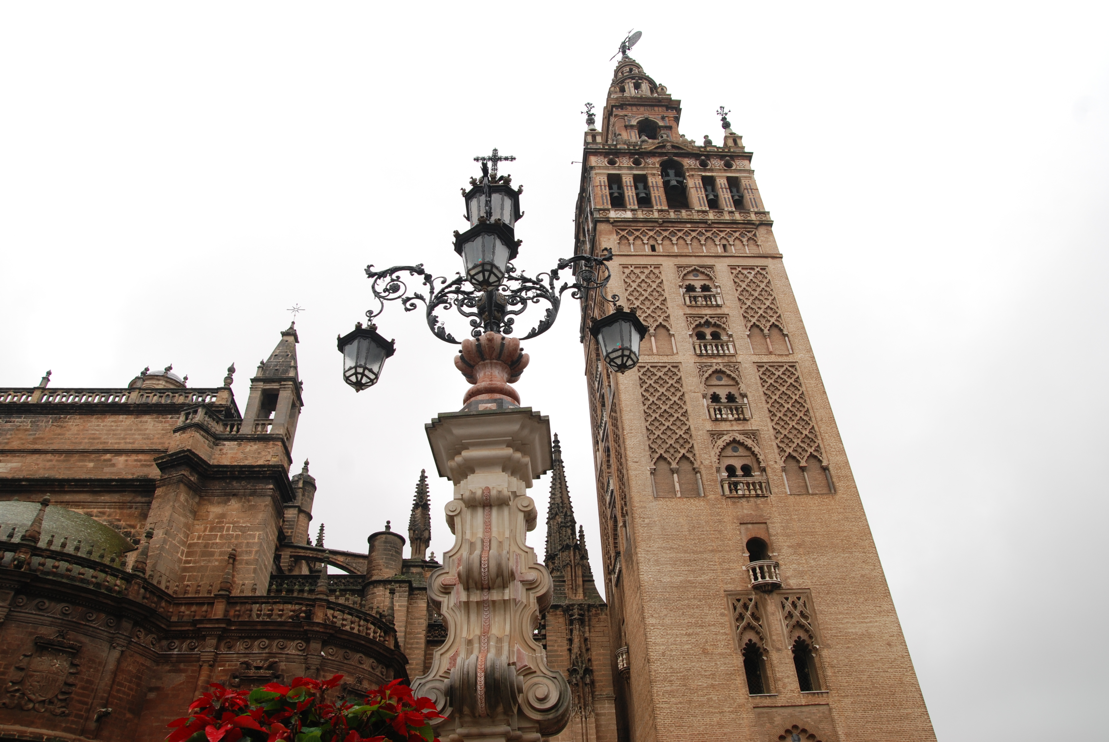 la giralda